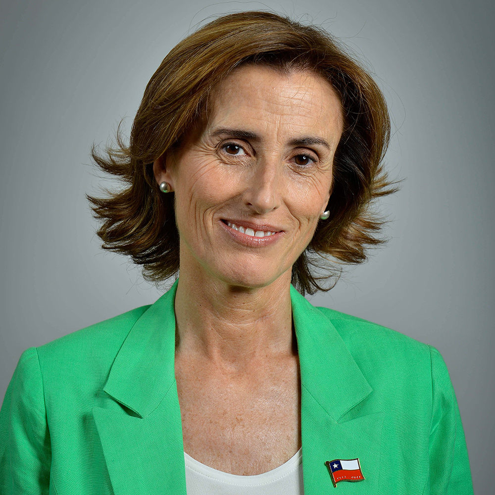 Foto oficial de Marcela Cubillos como ministra